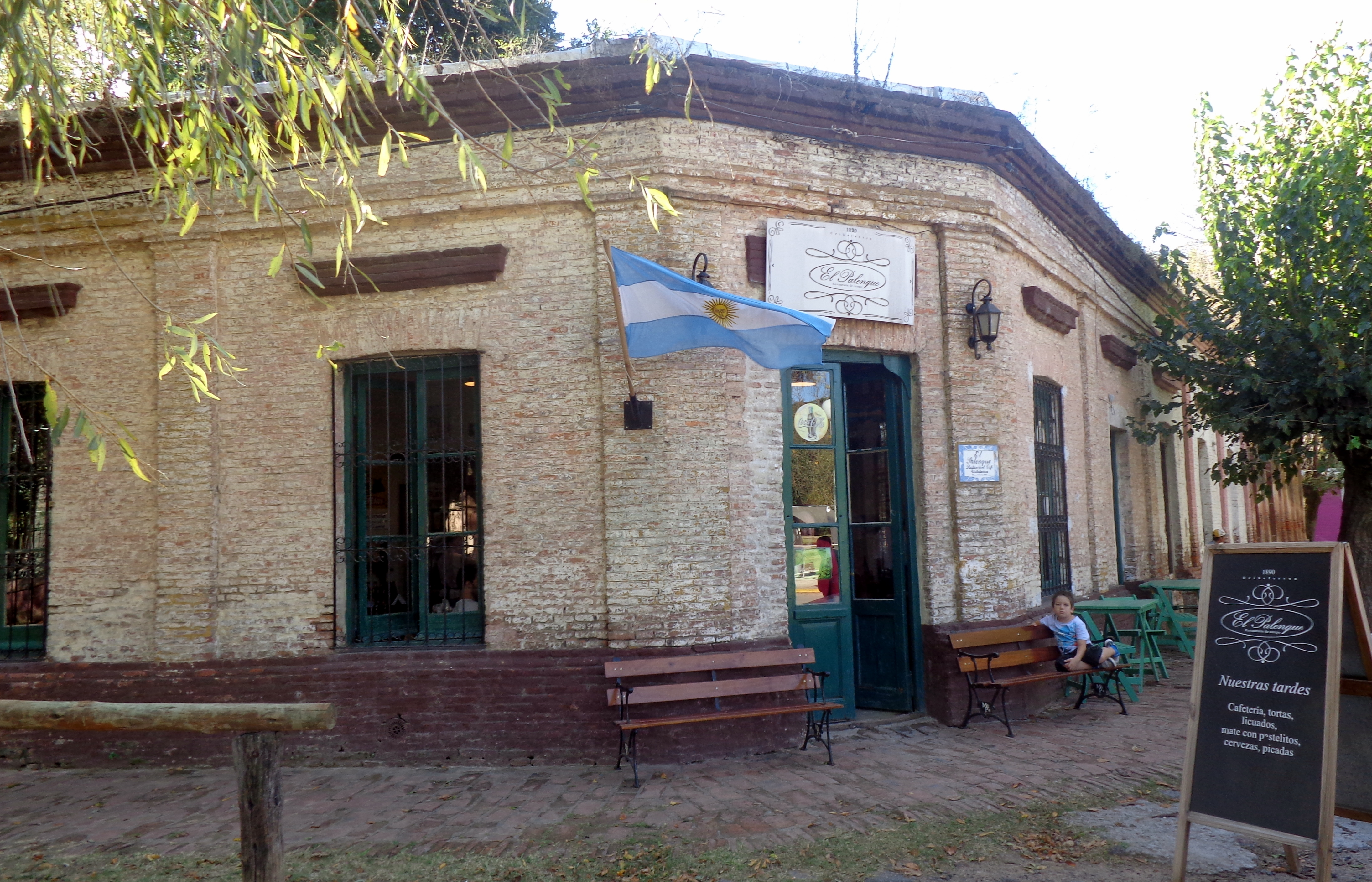 Restaurante Uribelarrea, esquina Manuel Belgrano, plaza Uribe, en Uribelarrea, Provincia de Buenos Aires, Argentina